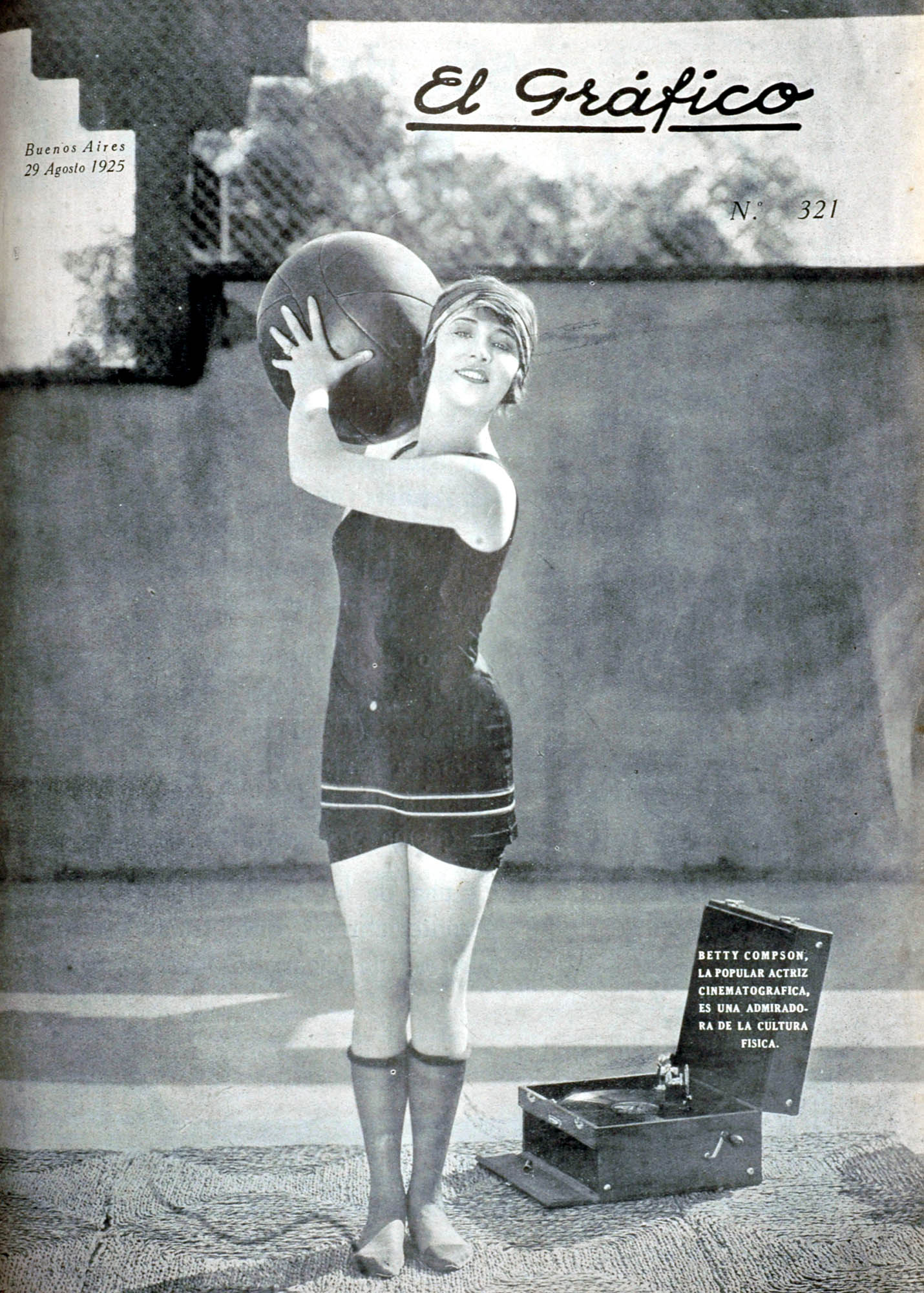 El Grafico del 29 de Agosto de 1925. Edicion 321